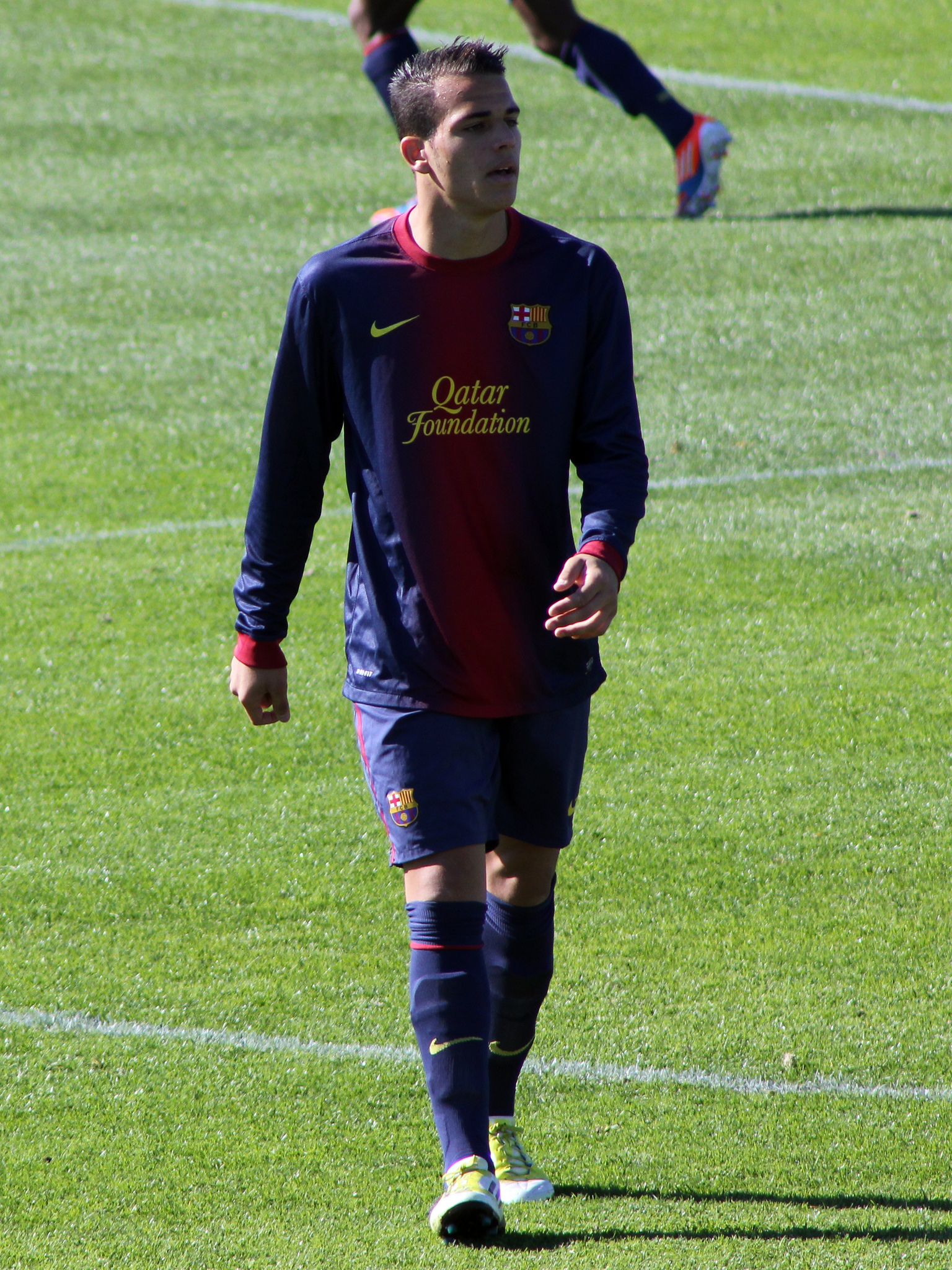 Foto realizada por Javier Segura (@castroquini)